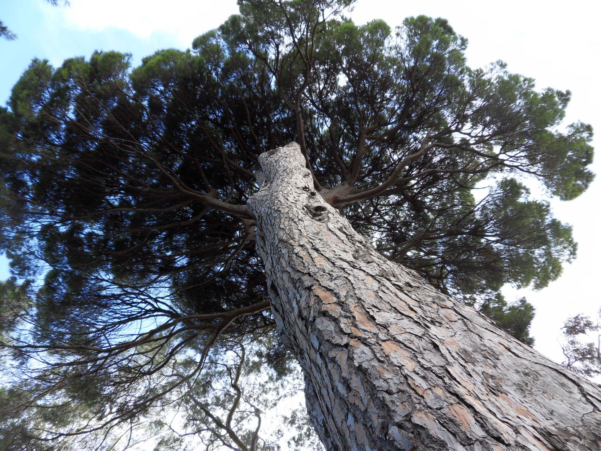 Pinus pinea - Pin parasol. Jardin de la villa Thuret à Antibes.